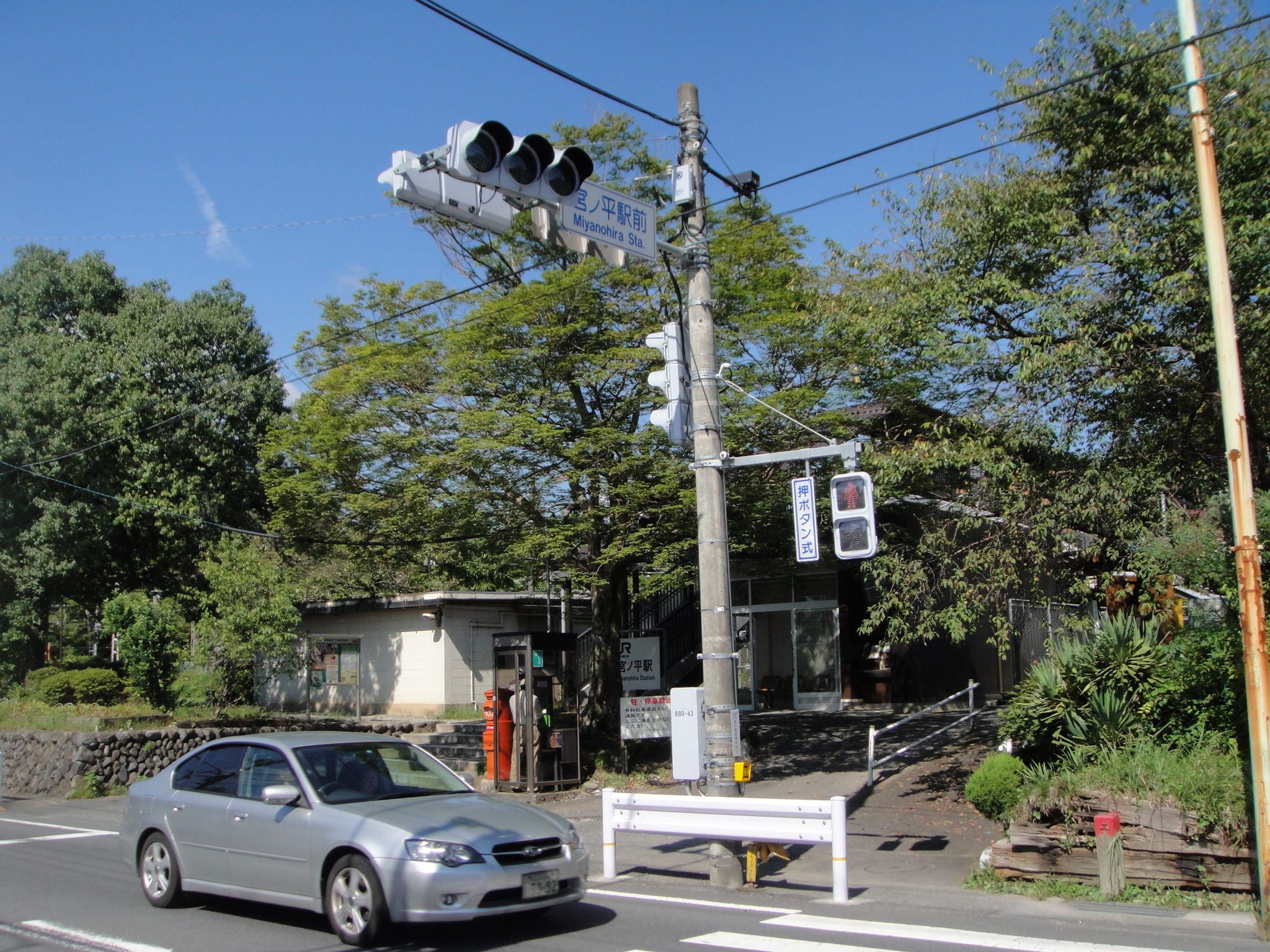 JR青梅線の宮ノ平駅前を撮影